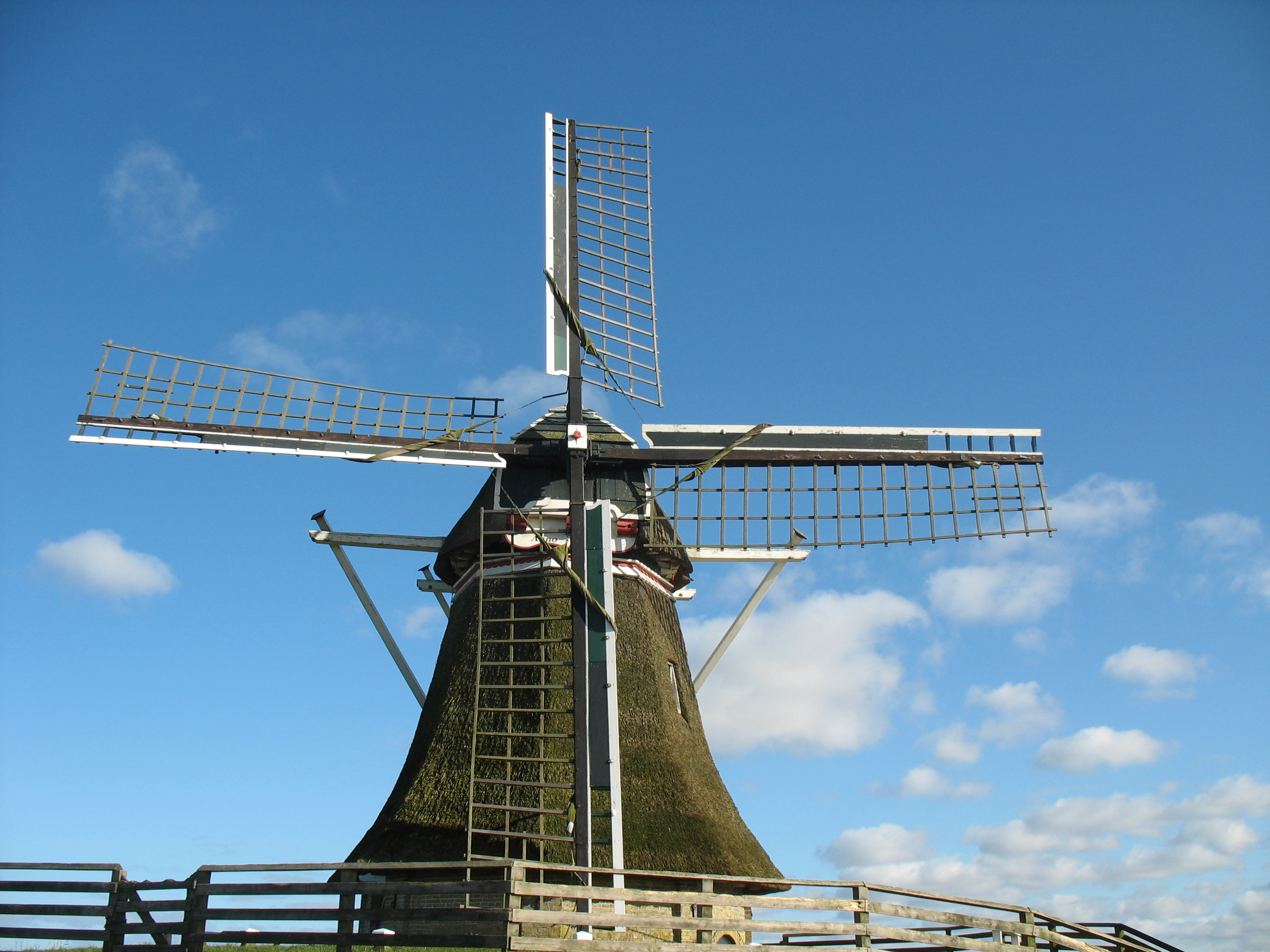 Dit is een foto van de Steenhuistermolen bij het Friese dorp Stiens. De molen werd in 1880 gebouwd voor het bemalen van de Steenhuisterpolder.